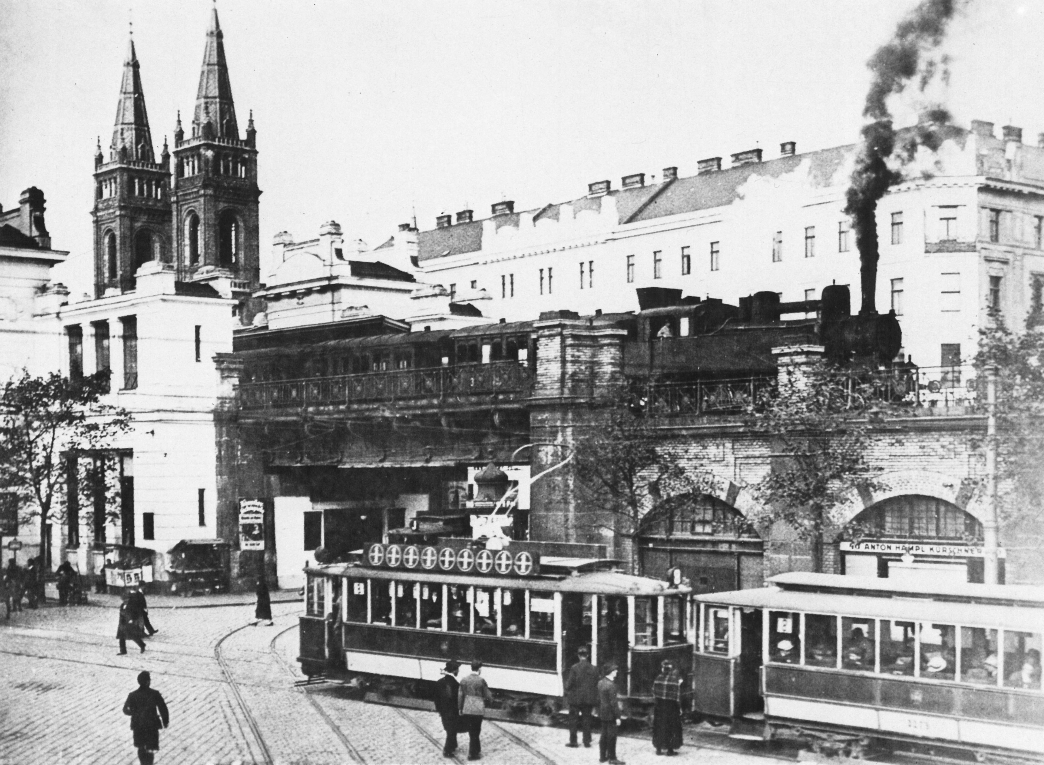 Wiener Stadtbahn vor der Elektrifizierung, im Hintergrund ist die Pfarrkriche Breitenfeld zu sehen